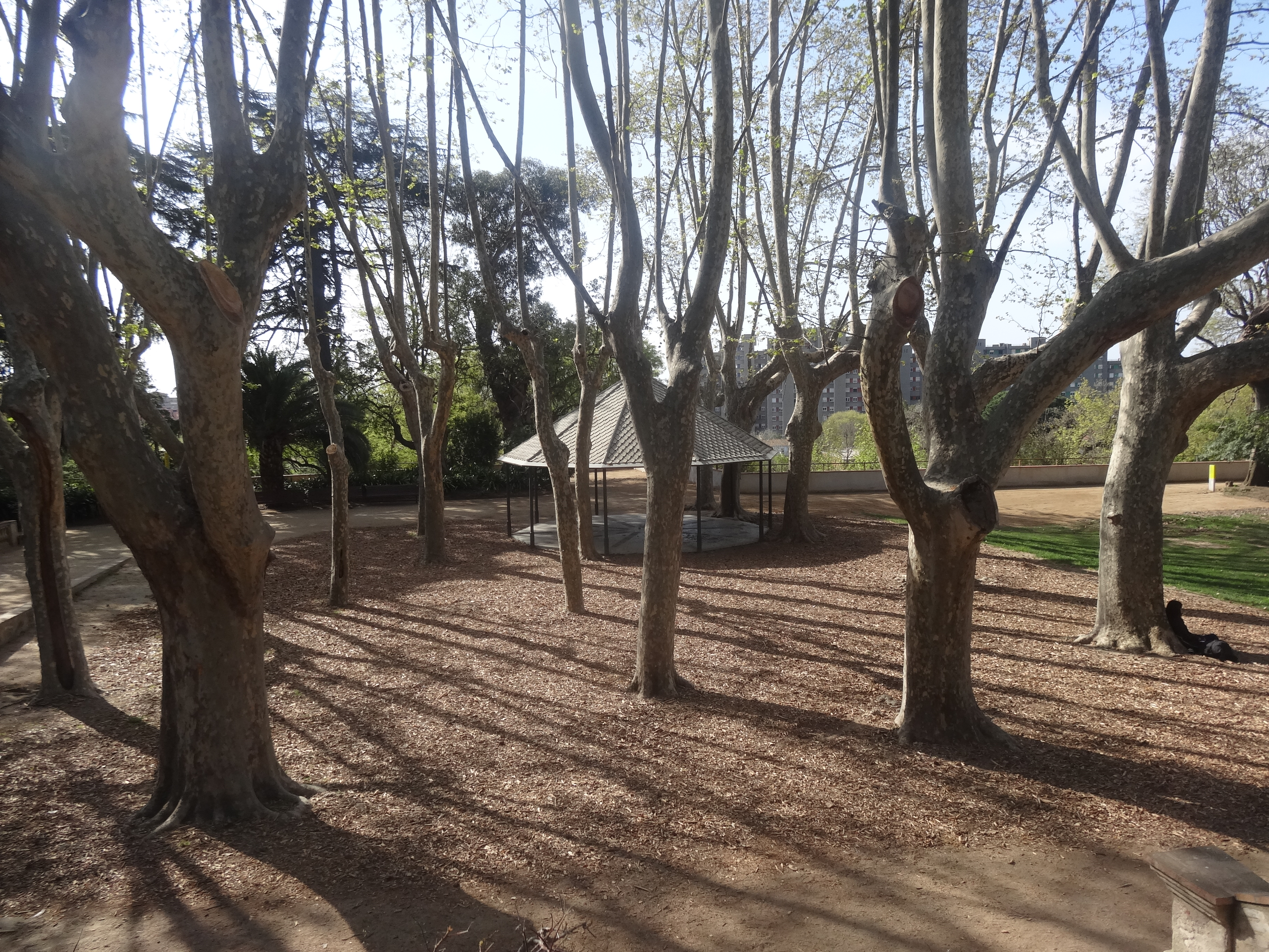 Parc de Can Solei i Ca l’Arnús, a Badalona.